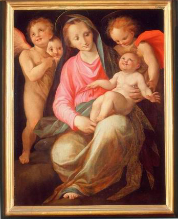 Museo dell'opera del duomo, prato, Madonna col Bambino di Maso da San Friano